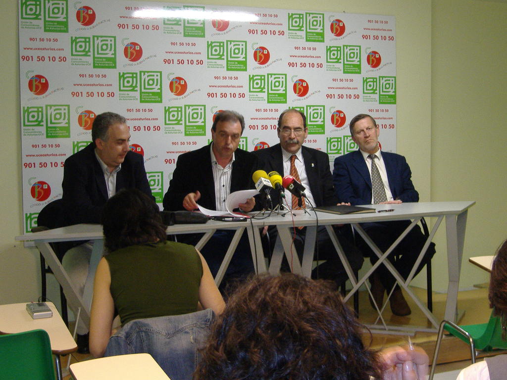 Sergio Marqués Fernández, Xuan Xosé Sánchez Vicente y el candidatu a l'alcaldía d'Uviéu Luis Enrique Martínez